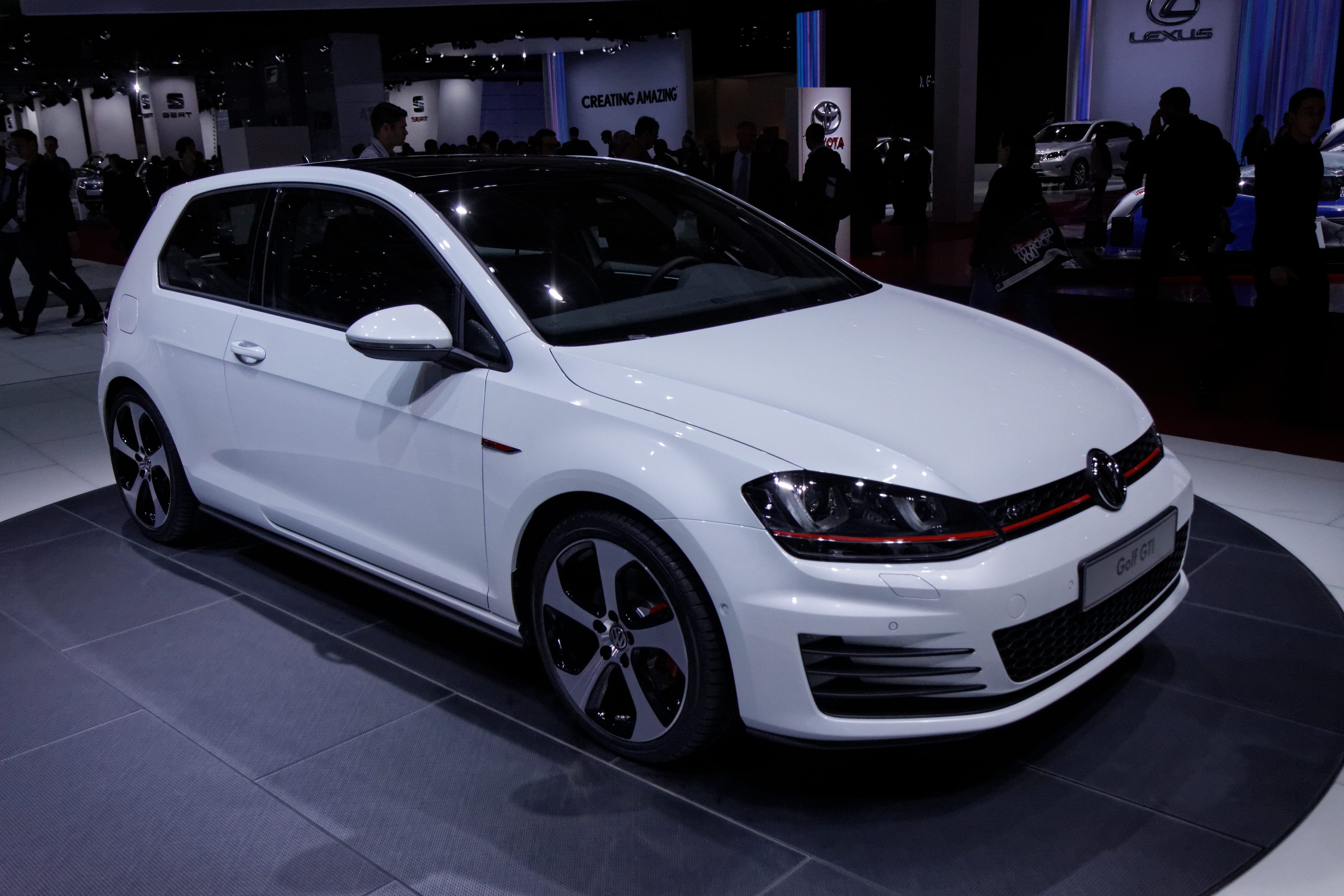 Une Volkswagen Golf présentée lors du Mondial de l'Automobile de Paris 2012.